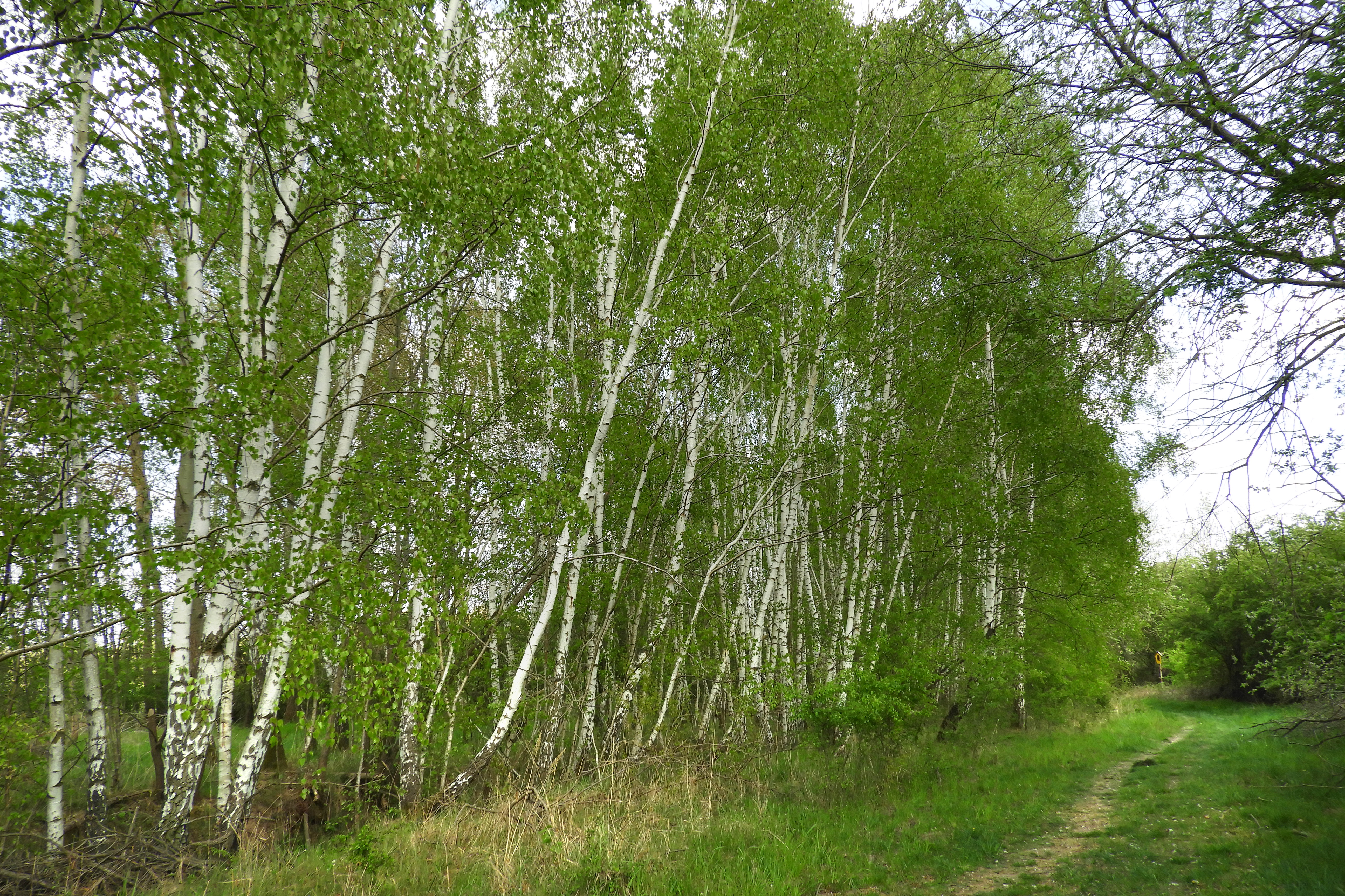 Die „Werraaue bei Berka und Untersuhl“ ist ein Naturschutzgebiet im westthüringischen Wartburgkreis. Das Schutzgebiet umfasst einen weitgehend naturnahen Abschnitt im mittleren Werratal, zwischen Dippach und Gerstungen, der durch Mäander, Altwässer und periodisch überschwemmtes Grünland geprägt wird. Als Lebensraum für seltene Vögel und Amhibien gilt der Wiesenbereich als überregional bedeutsam.